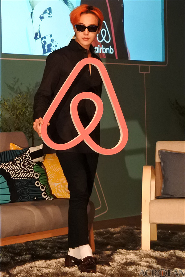 에어비앤비 x 지드래곤 아시아 5개국 프로젝트 발표회